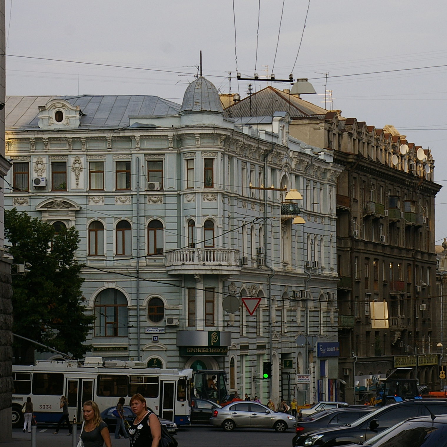 Харьков